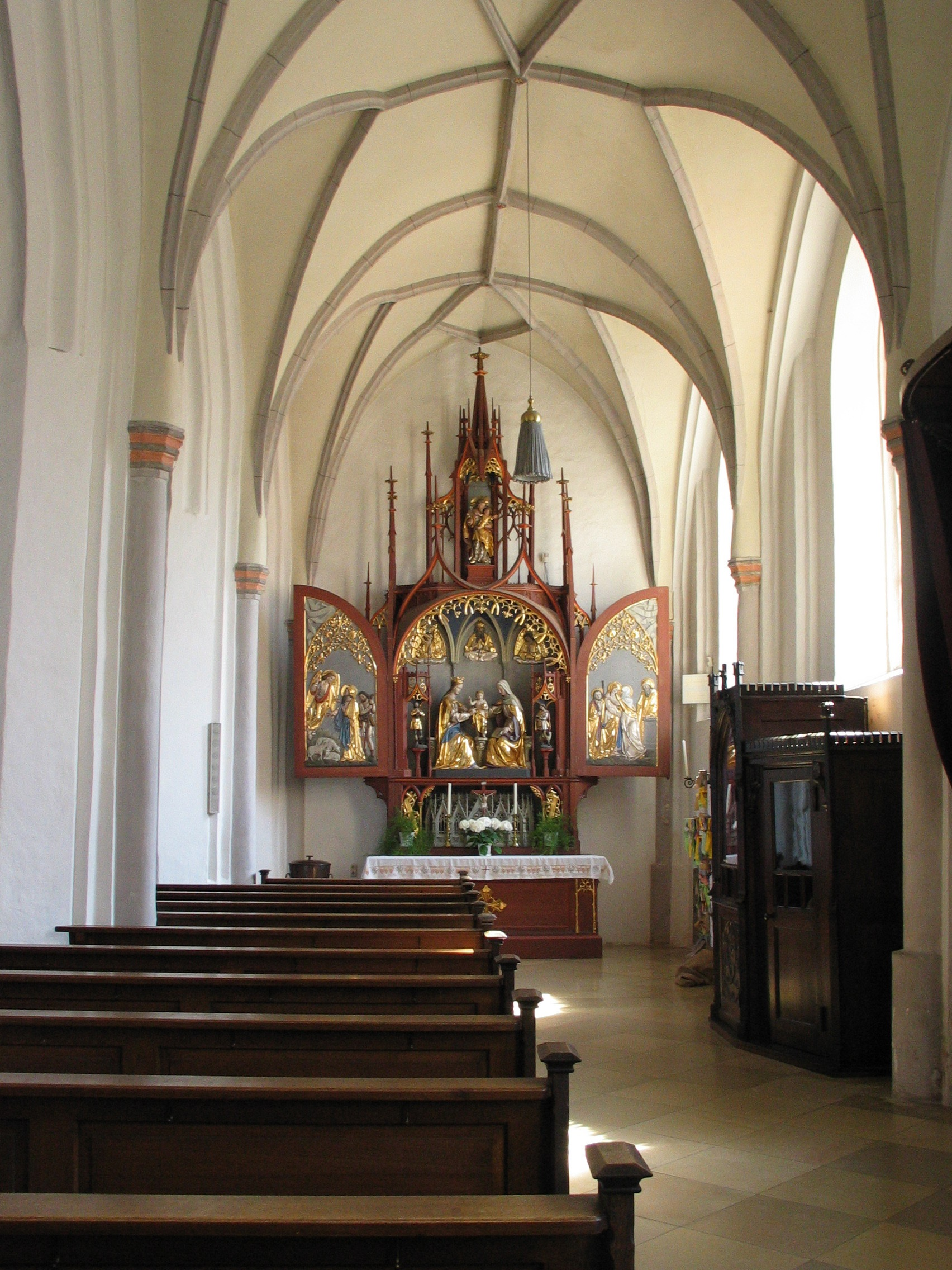 Frontenhausen, Kath. Pfarrkirche St. Jakob. Südlicher Seitenaltar.